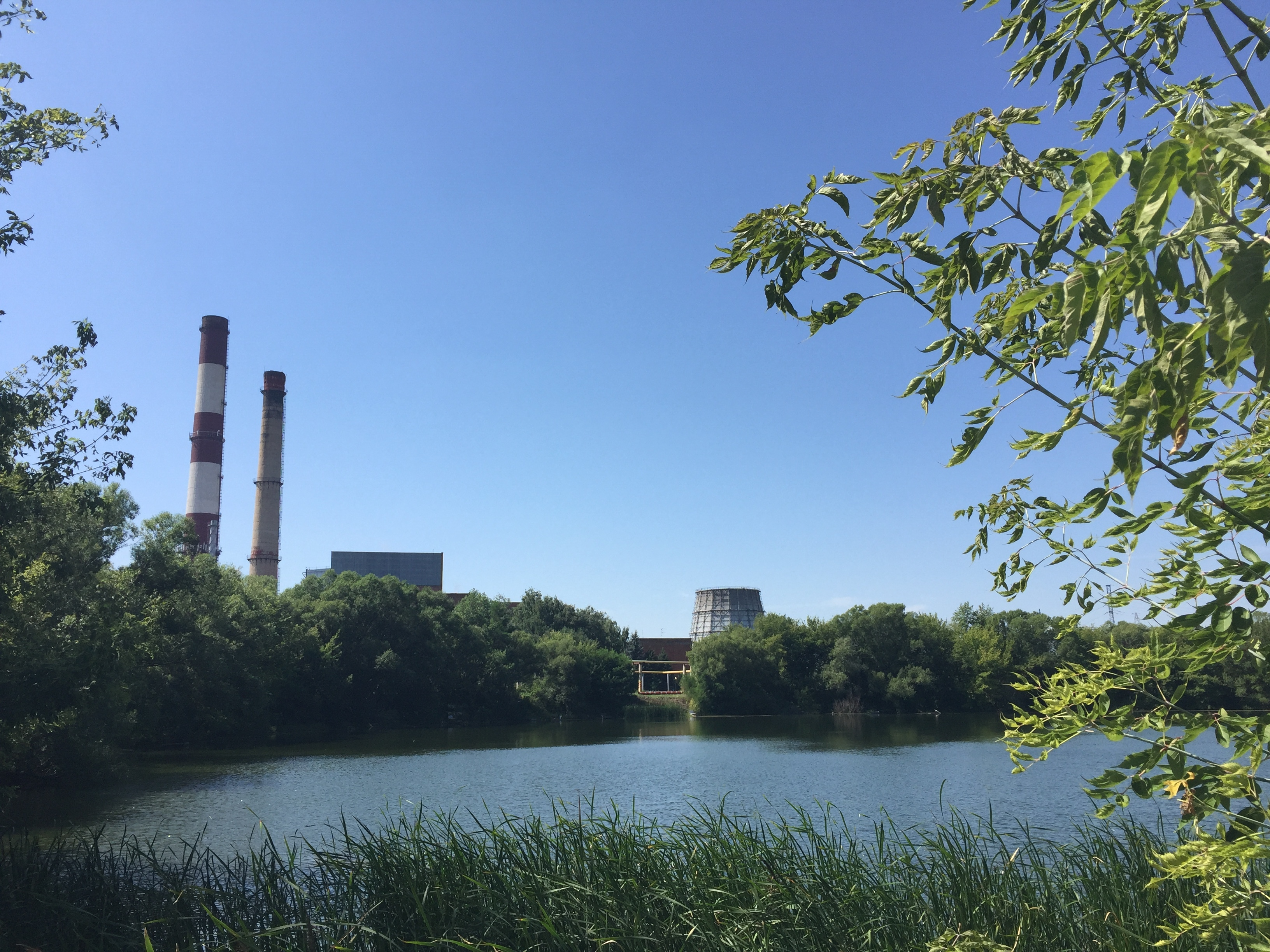 Вид на станцию с озера Ендова